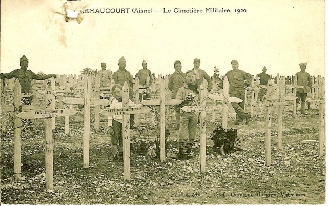 Carte postale du cimetière provisoire